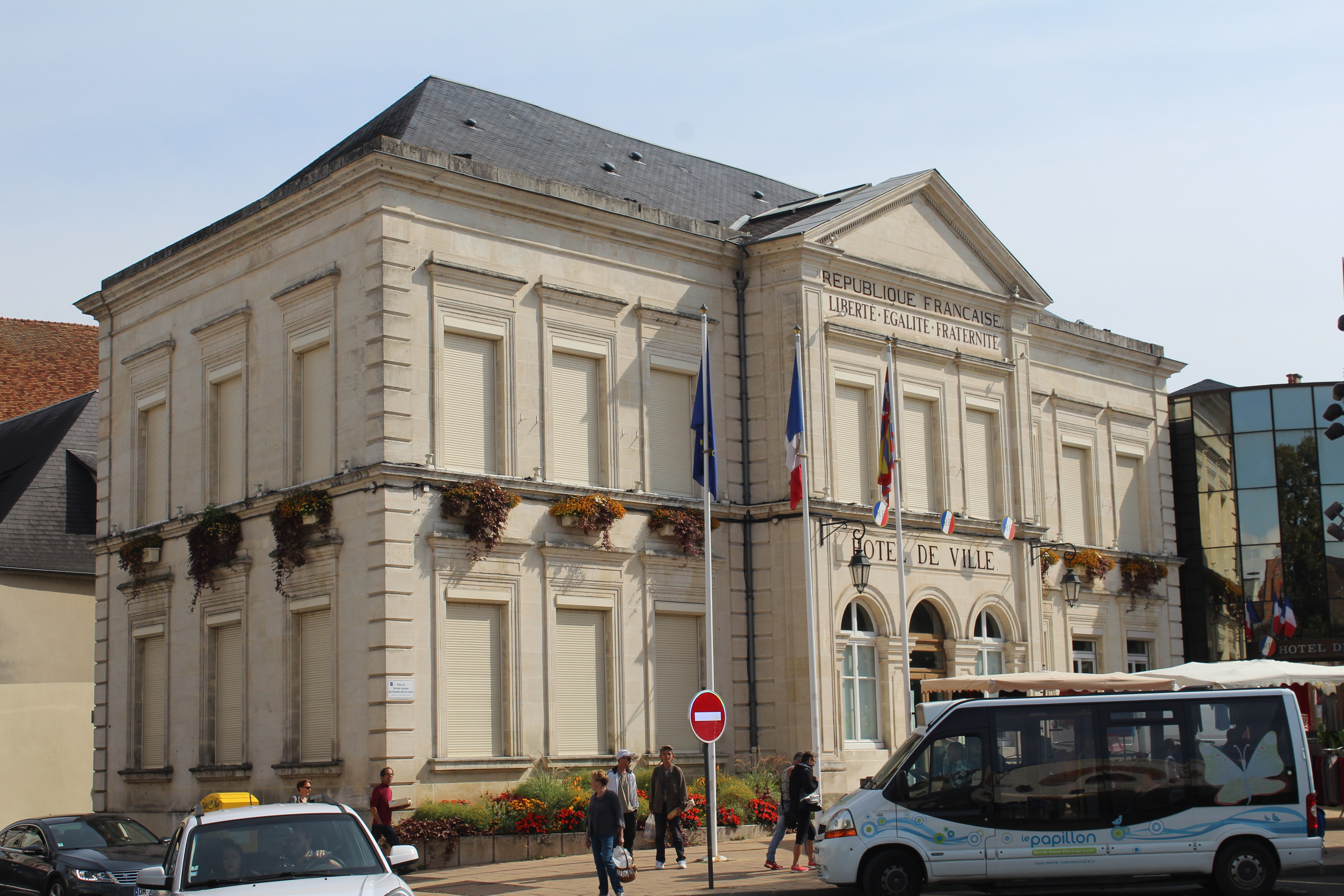 Hôtel de ville de Cosne-Cours-sur-Loire